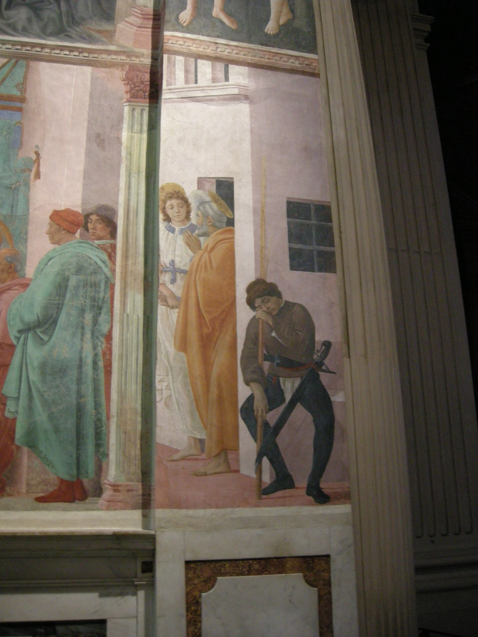 Cappella brancacci, Liberazione di San Pietro dal carcere